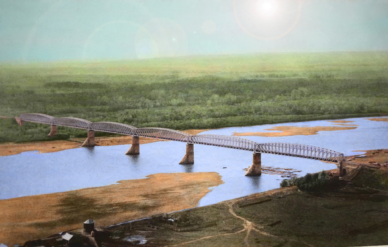 Первый уфимский железнодорожный мост через Белую реку.